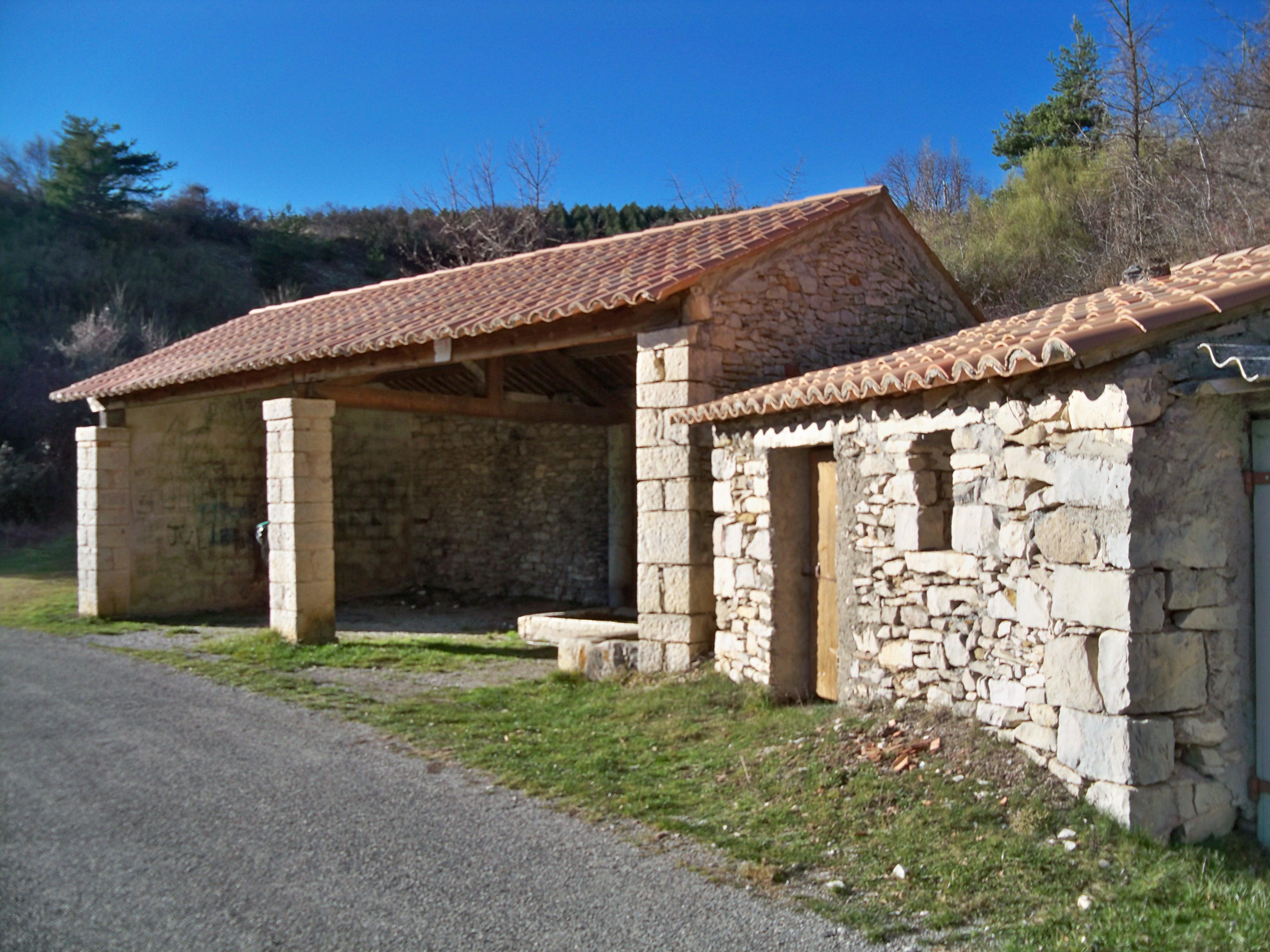 Lavoir du hamps de l'Amant, commune de L'Hospitalet (04), France